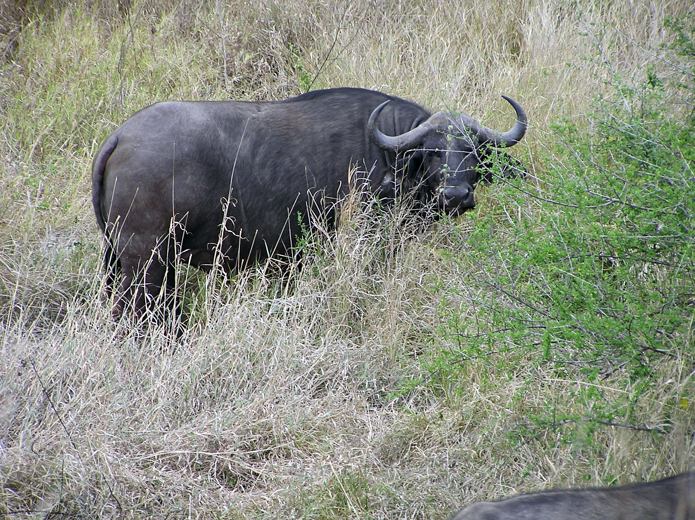 Kaffernbüffel (Syncerus caffer) im Krugerpark, Südafrika.